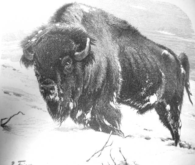 Bildunterschrift im Originalwerk: Amerikanischer Bison (Bos s. Bison americanus). Körperlänge 2,50 - 2,80 m, Schwanzlänge 0,65 m, Höhe 1,50 m